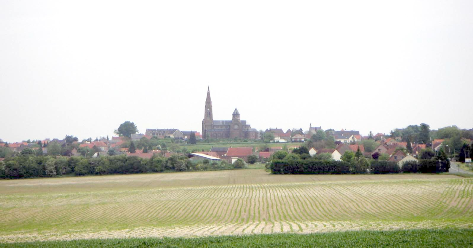 Vue de Oisy-le-Verger en arrivant de Sauchy-Lestrée. Image prise par Padawane le 19 mai 2005 (pas de ©) Padawane